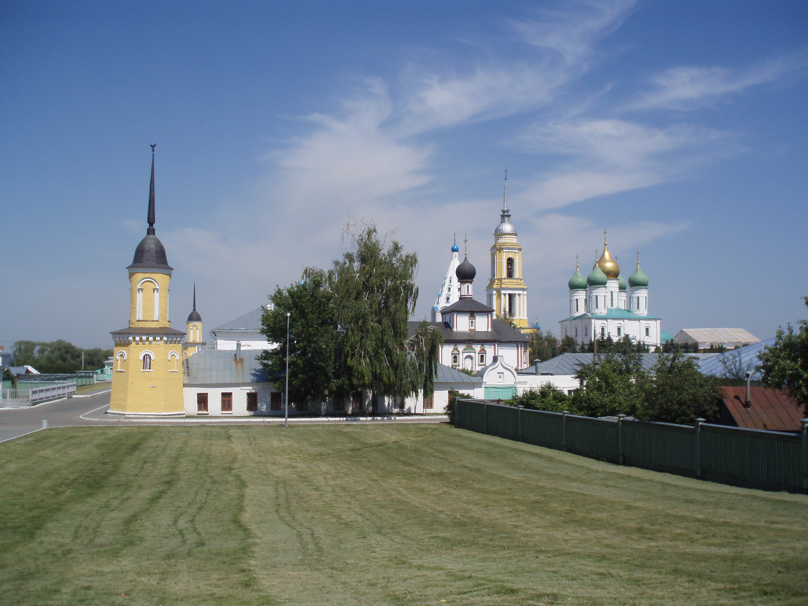 Монастырь Троицкий Ново-Голутвин (Москва и Московская область, Коломна, Лазарева улица, 9)